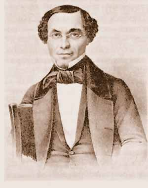 Кони, Фёдор Алексеевич